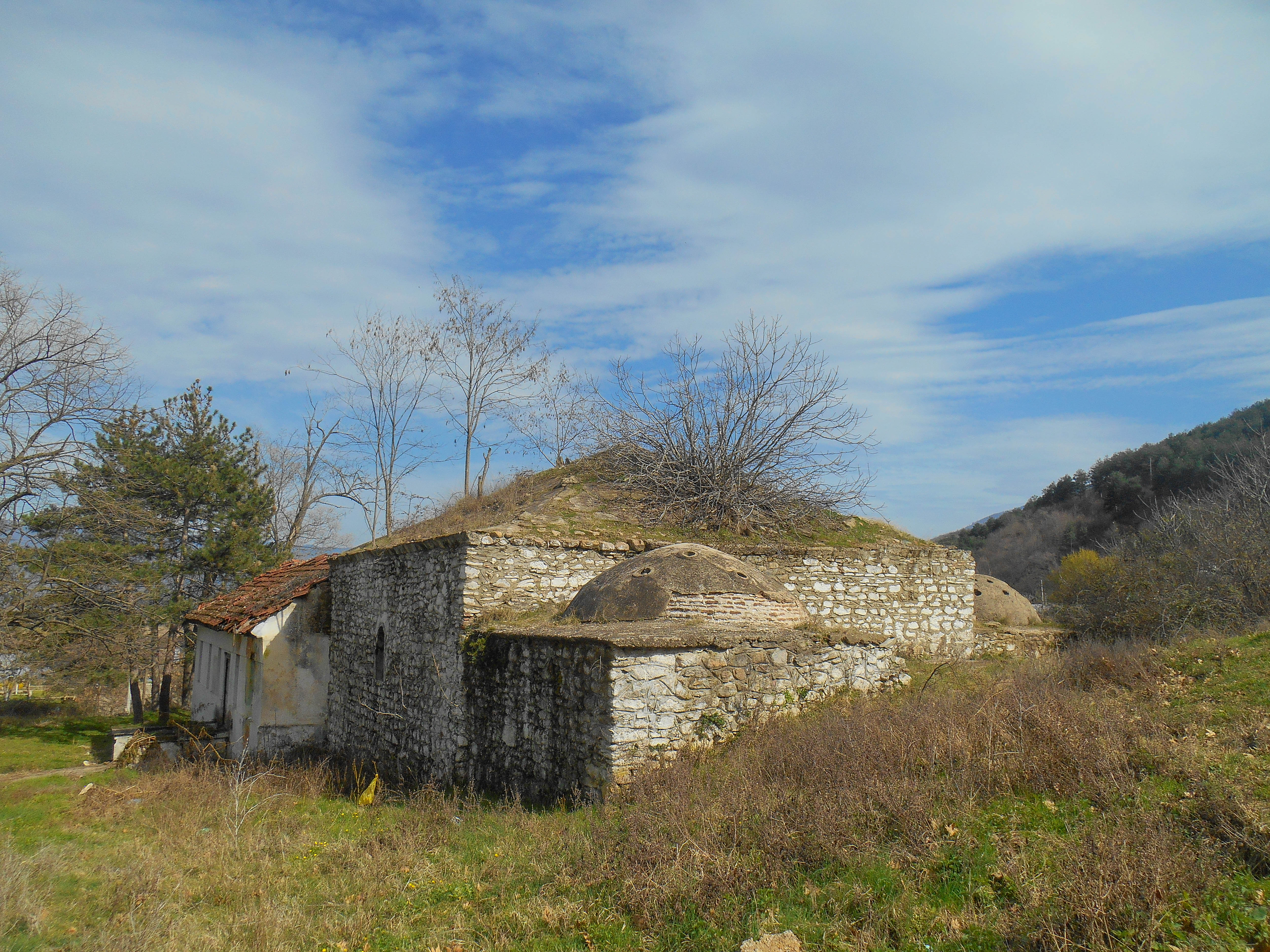 Турска бања во Банско